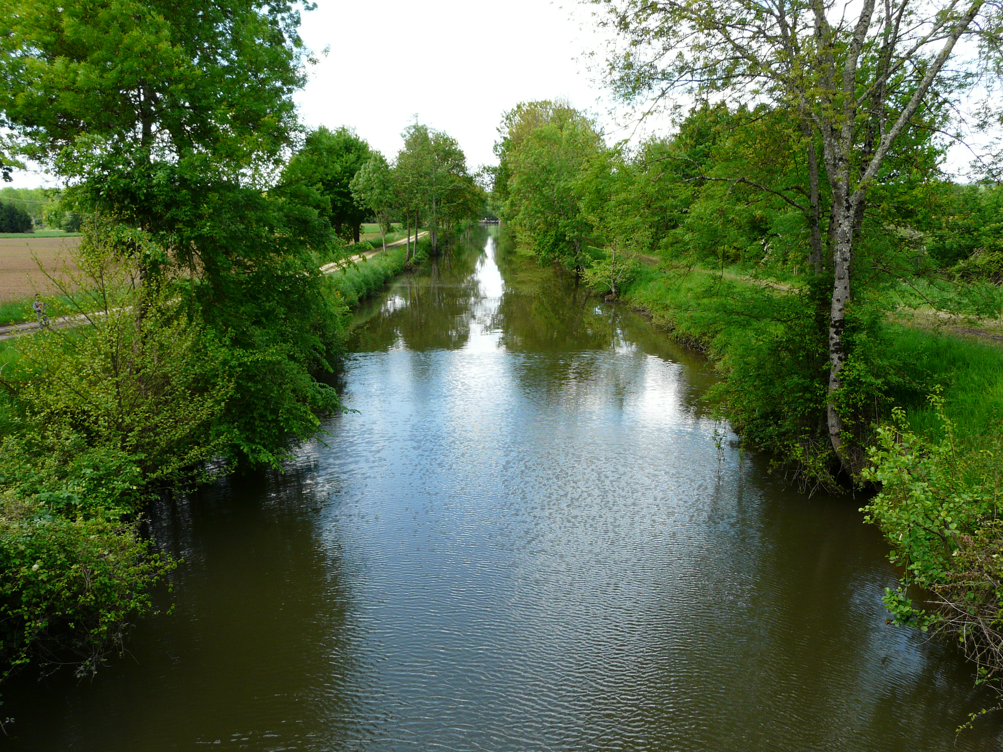 Le canal de la Filolie, Saint-Laurent-des-Hommes, Dordogne, France